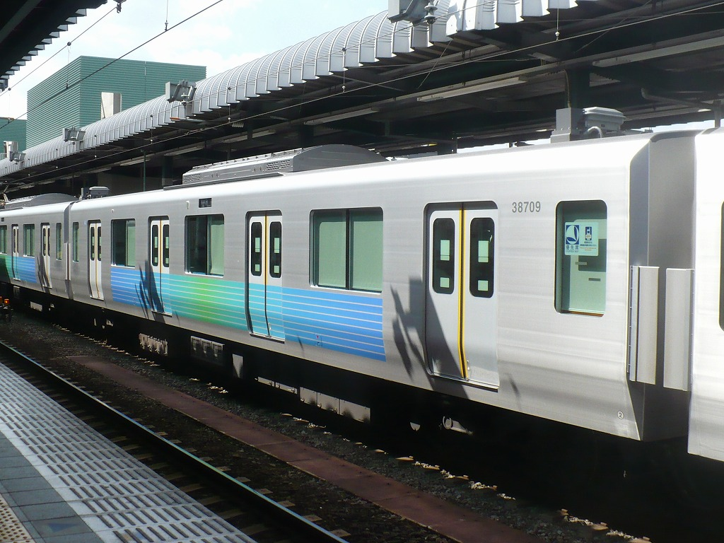 西武30000系